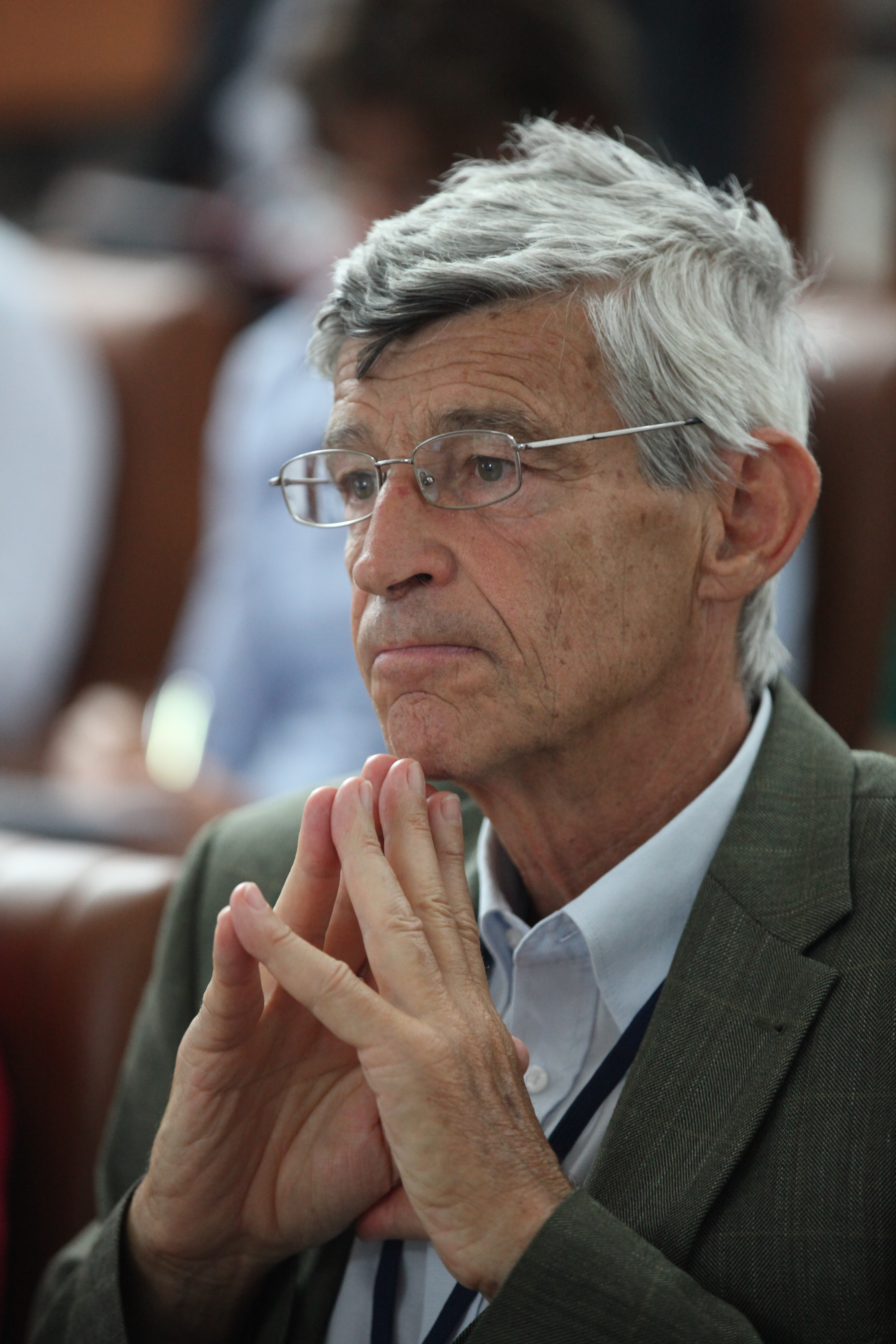 Walter Pieringer auf der RPP-Fachtagung "Islamophobie"